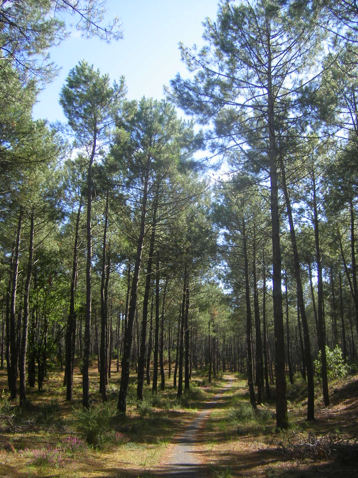 Piste cyclable, Foret Saint-Julien, avec Pinus pinaster